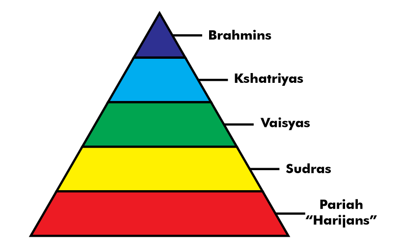 Sistema de castas na Índia